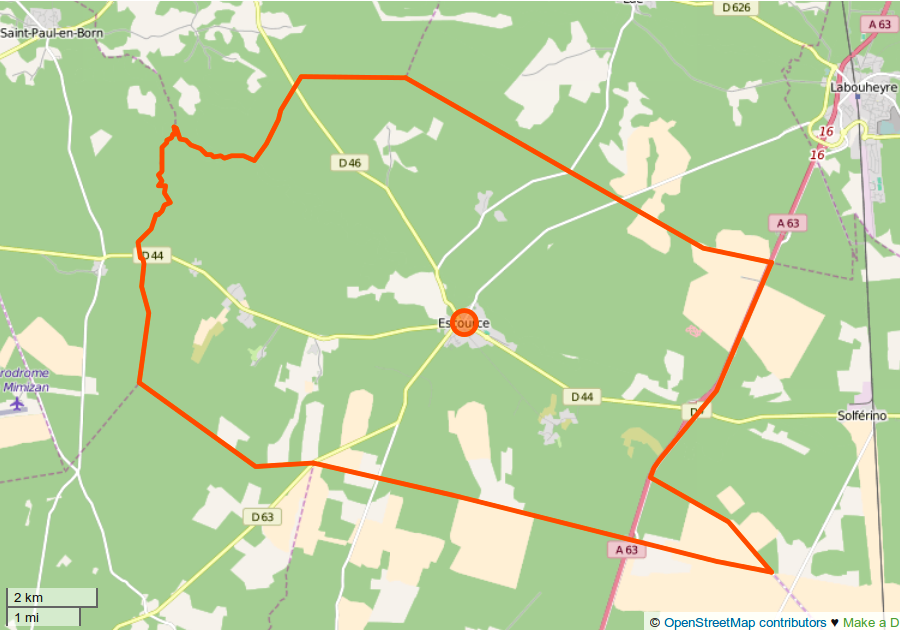 Escource (Landes) ː Limites communales (OSM). This map may be incomplete, and may contain errors. Don't rely solely on it for navigation.